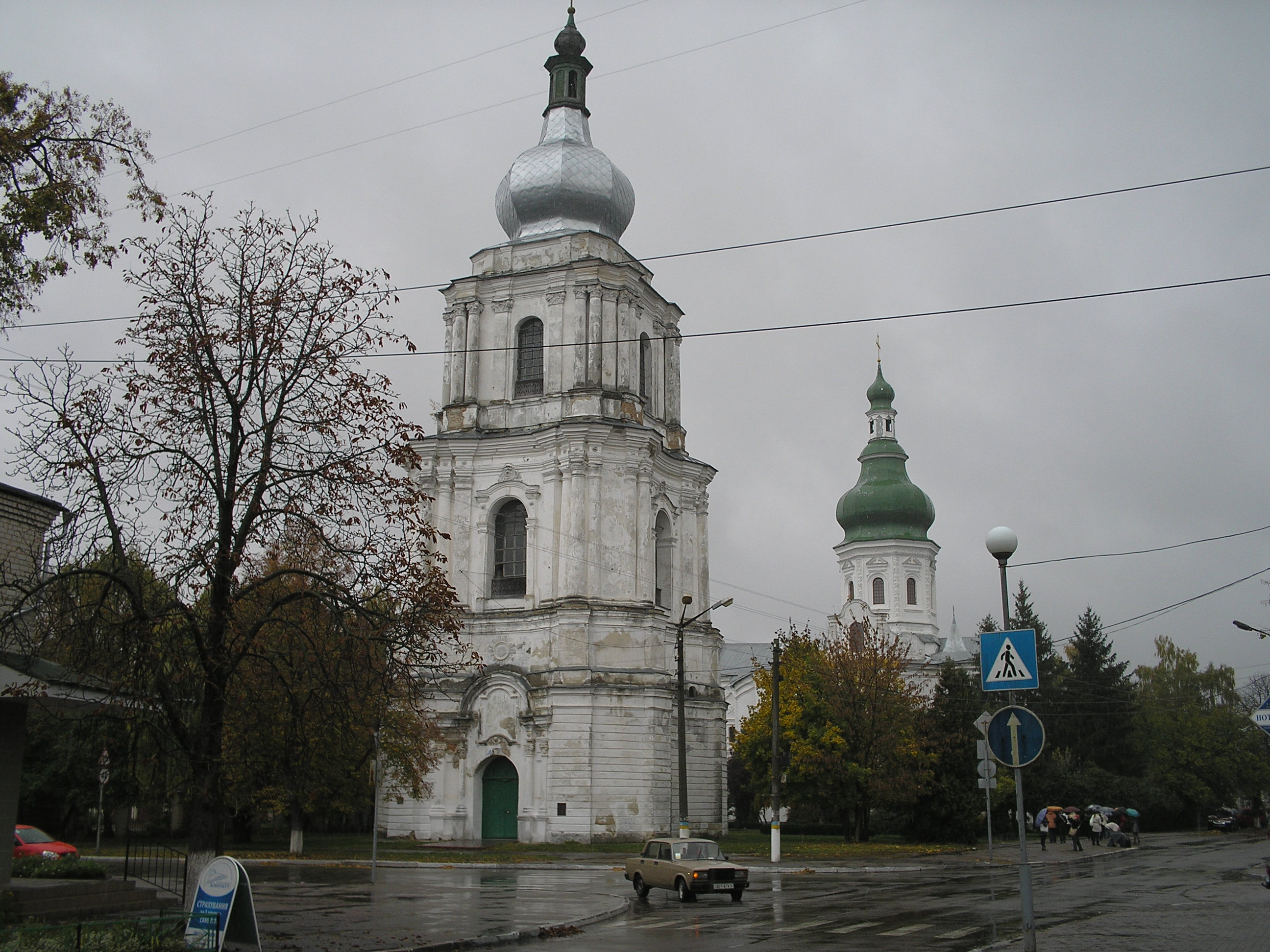 Вознесенський собор (мур.) 1700 р. Переяслав-Хмельницький? вул.Г.Сковороди,54